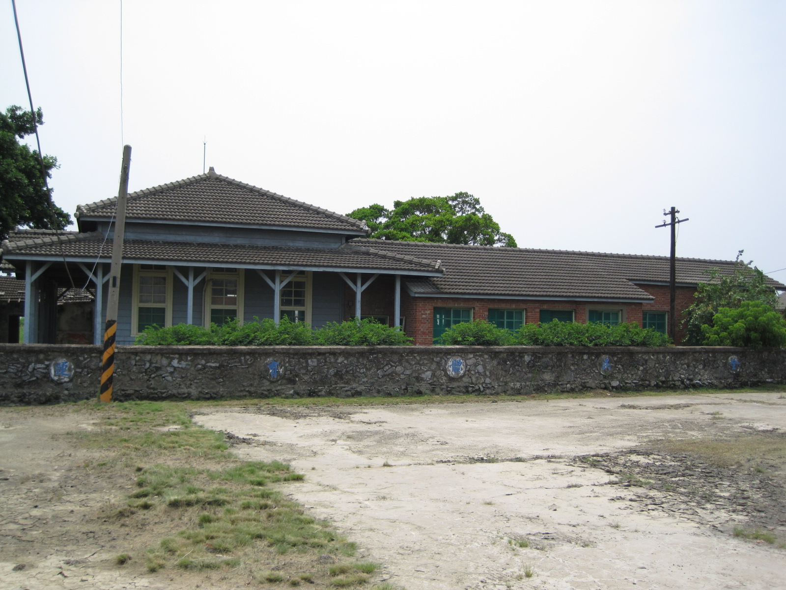 臺灣總督府專賣局臺南安順分室北面